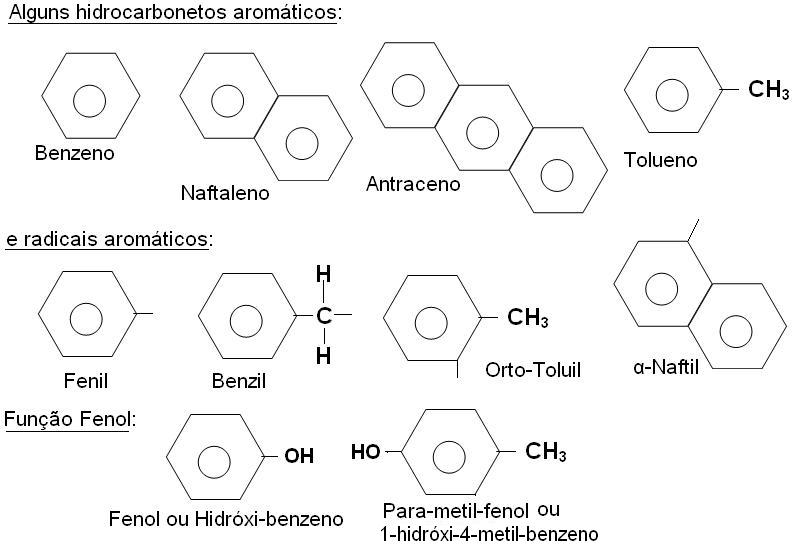 == Correção para artigo da wikipedia (meu primeiro artigo editado e minha primeira imagem no commons lol)